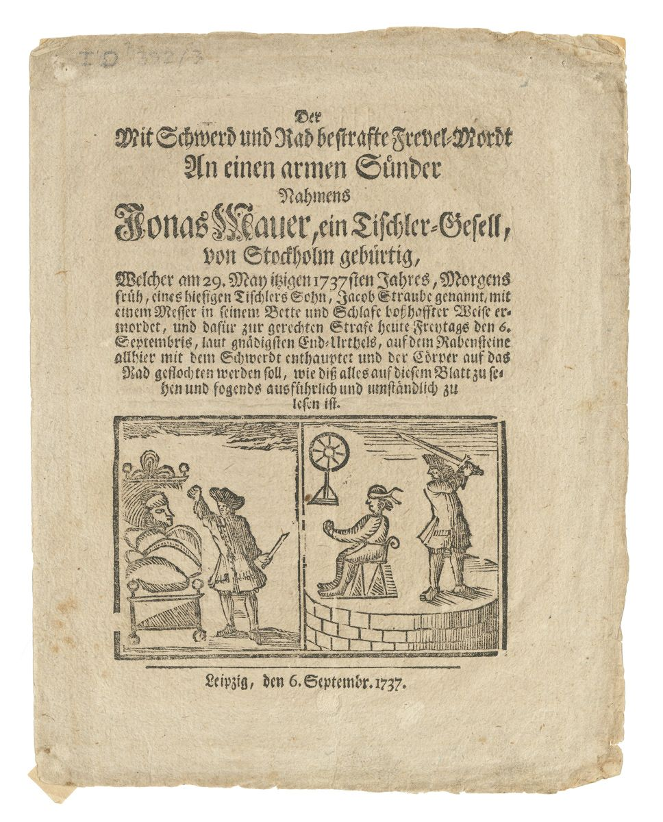 Exekutionszettel zu einer Hinrichtung am 6. September 1737 auf dem Rabenstein in Leipzig